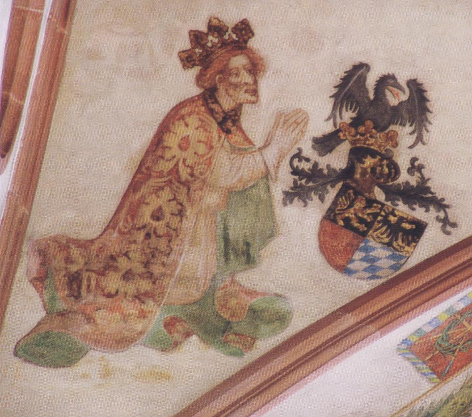 Kurfürst Ruprecht III. von der Pfalz, als Ruprecht I. auch Deutscher König, Gemälde im Chor der Stiftskirche Neustadt an der Weinstrasse.